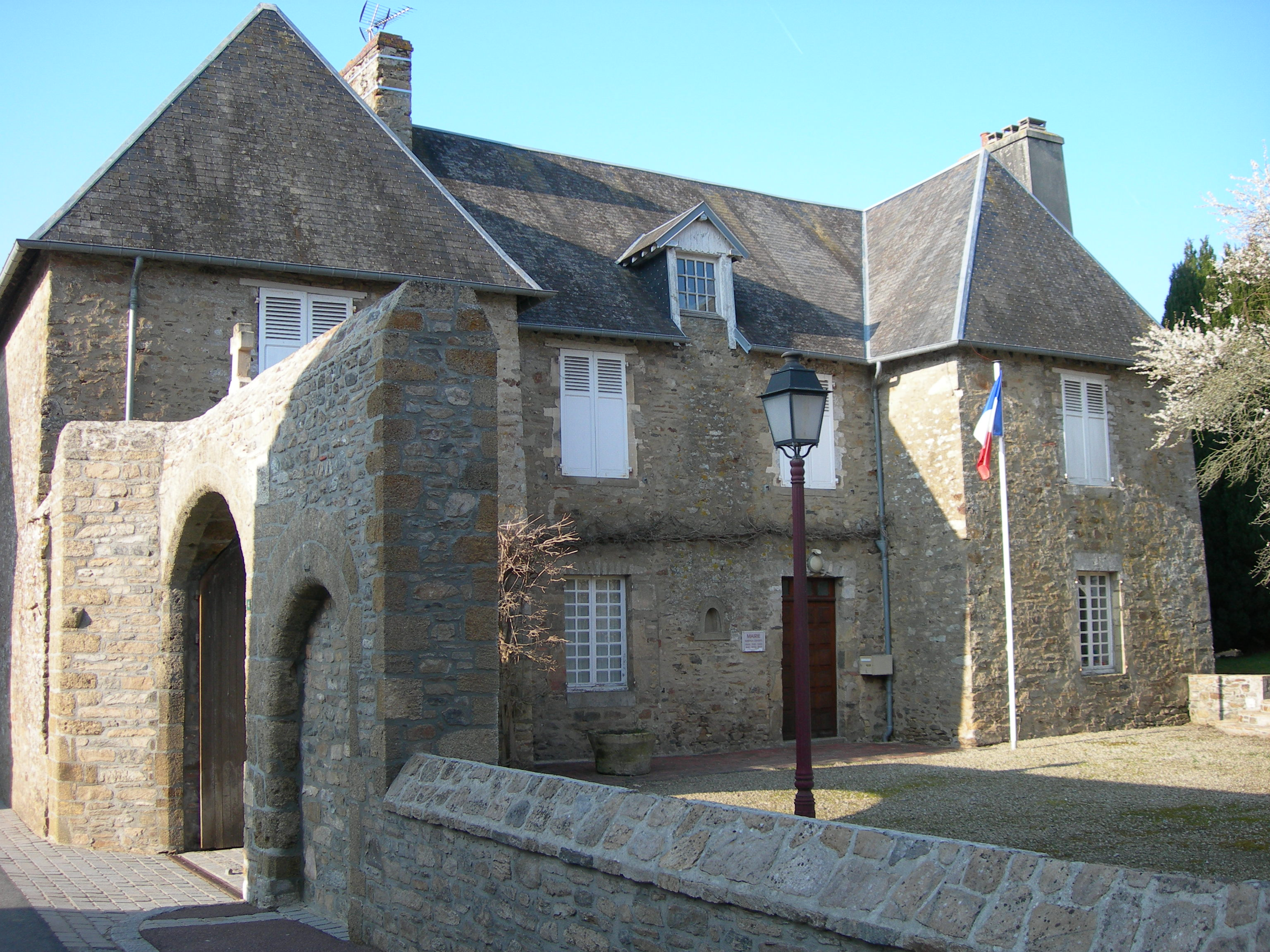 Mairie de Remilly-sur-Lozon (Remilly Les Marais)